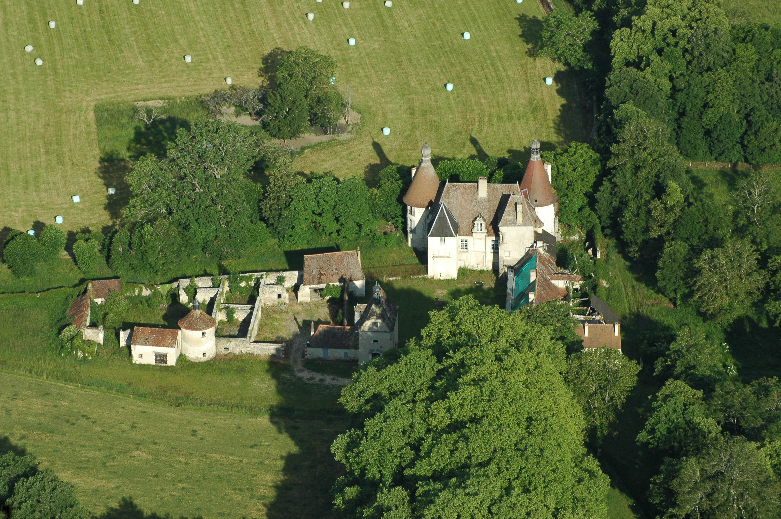 Le château du Vieux Bostz à Besson, Allier, France.